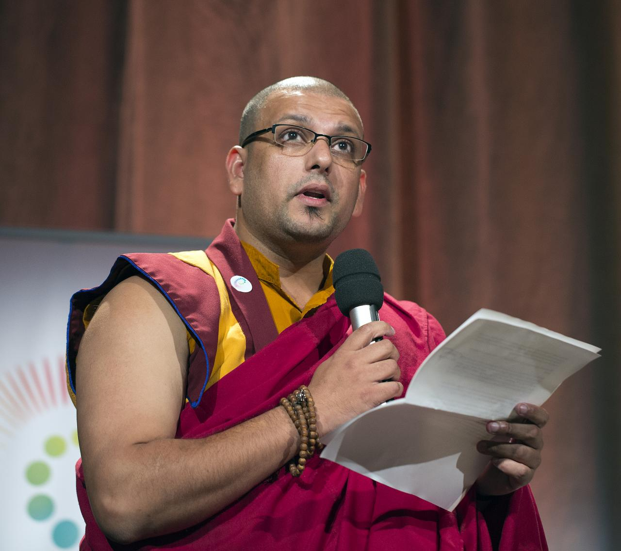 Tenzin Priyadarshi at Dalai Lama's visit to Boston